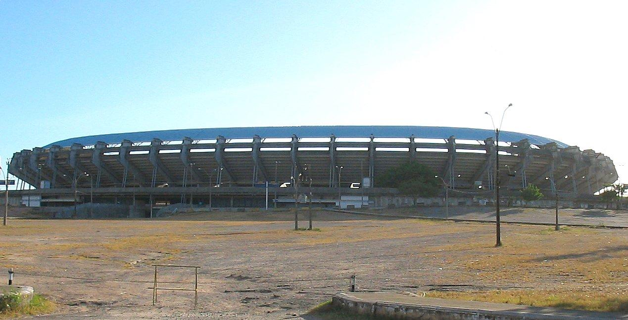 Estádio Plácido Castelo em Fortaleza